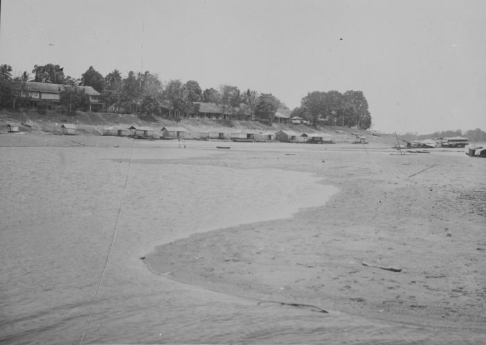 Panoramafoto. Deze foto is het rechterdeel van een uit twee delen bestaande panoramafoto (60045295-60045296).. Gezicht op Sintang aan de Kapuas-rivier bij zeer lage waterstand